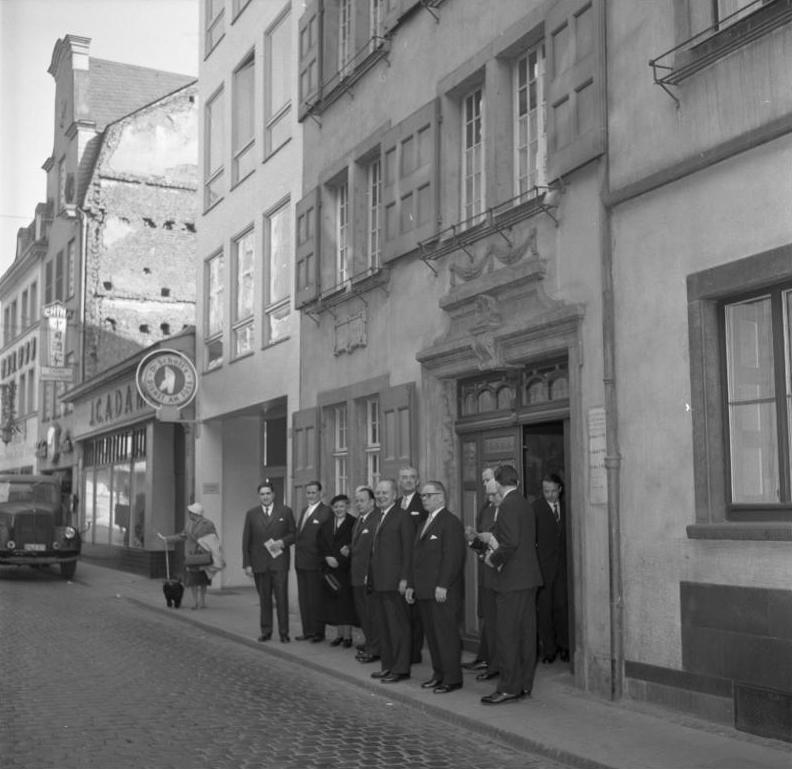 Finnische Politiker besuchen das Beethovenhaus, Bonn